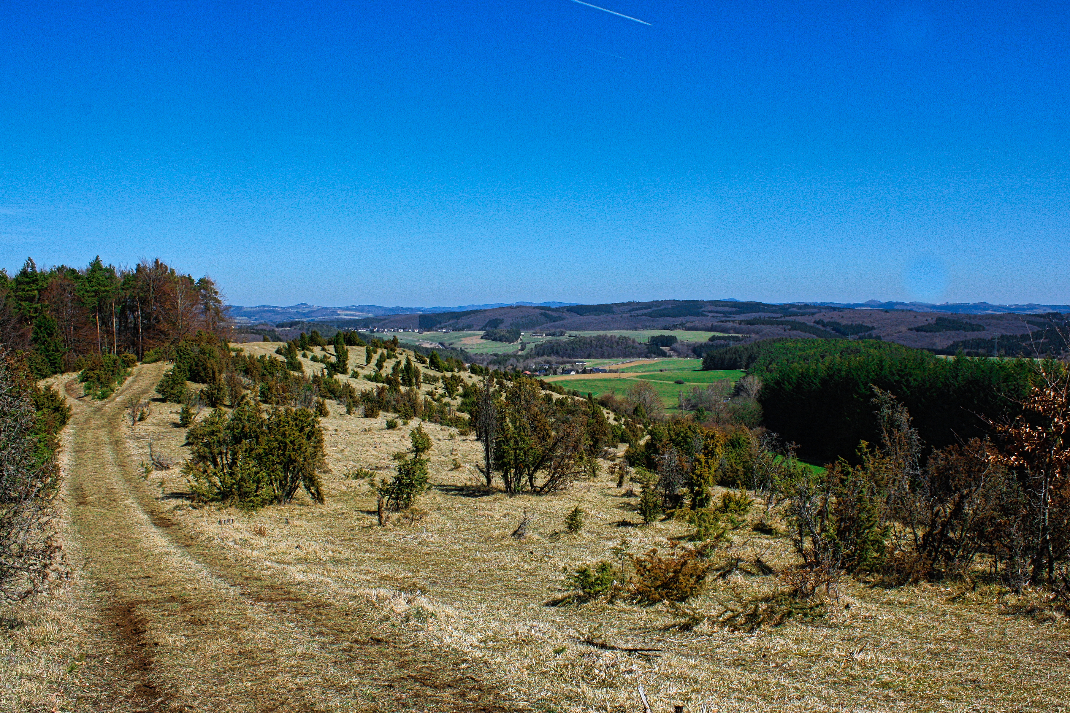 Am Hönselberg